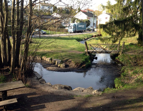 Hovinbekken ved Nordalveien i Oslo, på et lite og idyllisk parkmessig strekk.